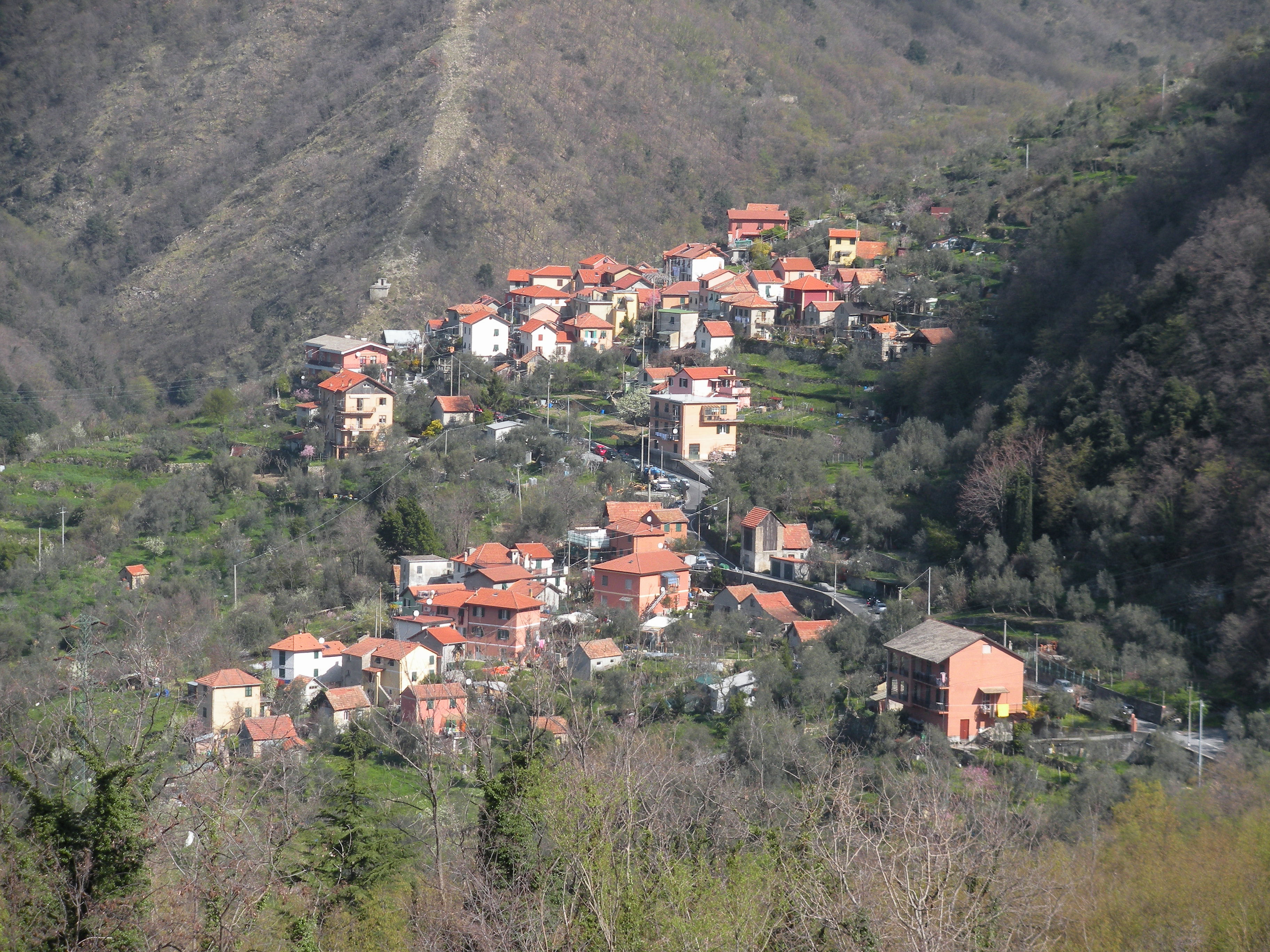 Panorama di Cartagenova (Molassana, quartiere di Genova)